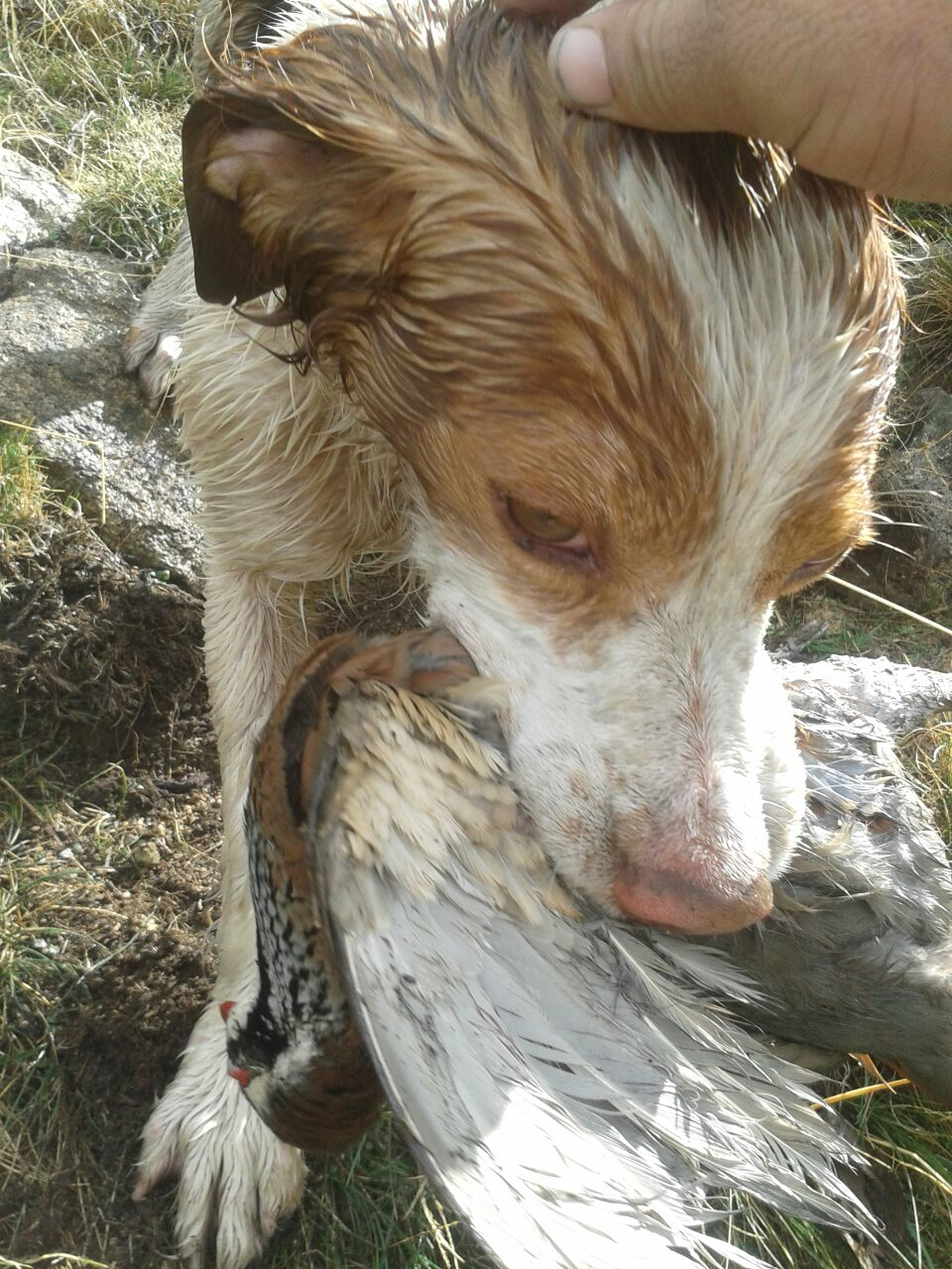 Perdiz roja cazada con escopeta en la Sierra de Villafranca (término municipal de Villafranca de la Sierra), cobrada por Tico, un hispano bretón